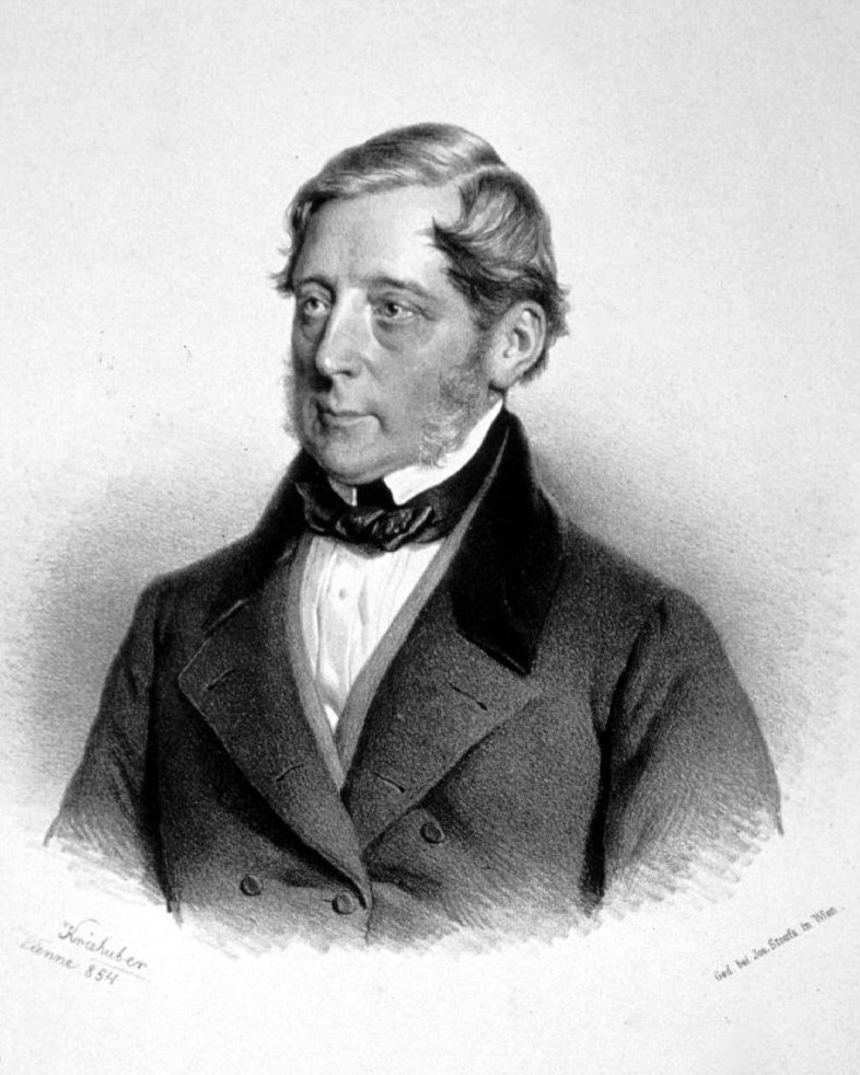 Karl Ferdinand von Buol-Schauenstein (1797-1865), österreichischer Statsmann, Diplomat, Außenminister. Lithographie von Josef Kriehuber , 1854